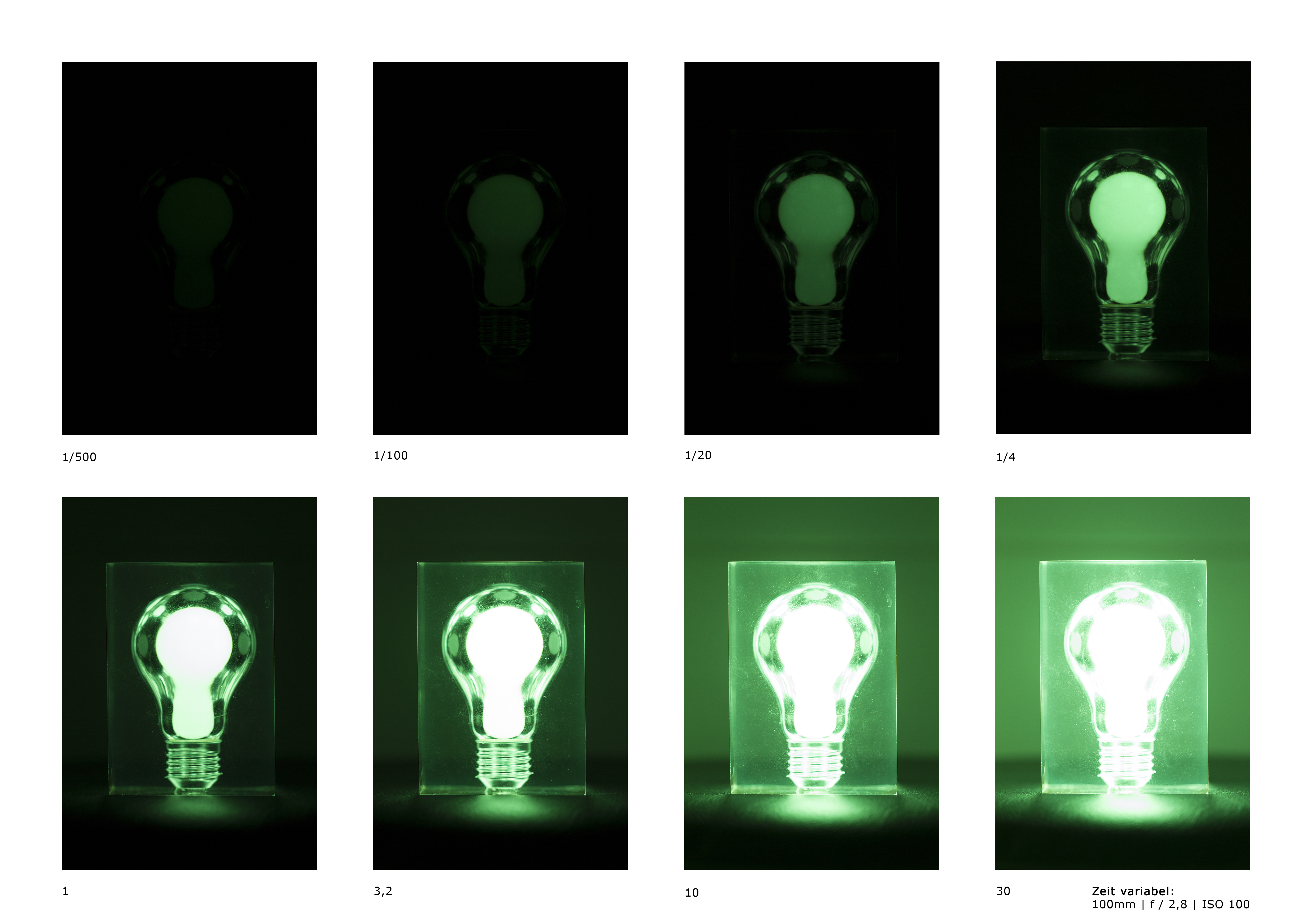 Einfluss der Zeit auf die Belichtung